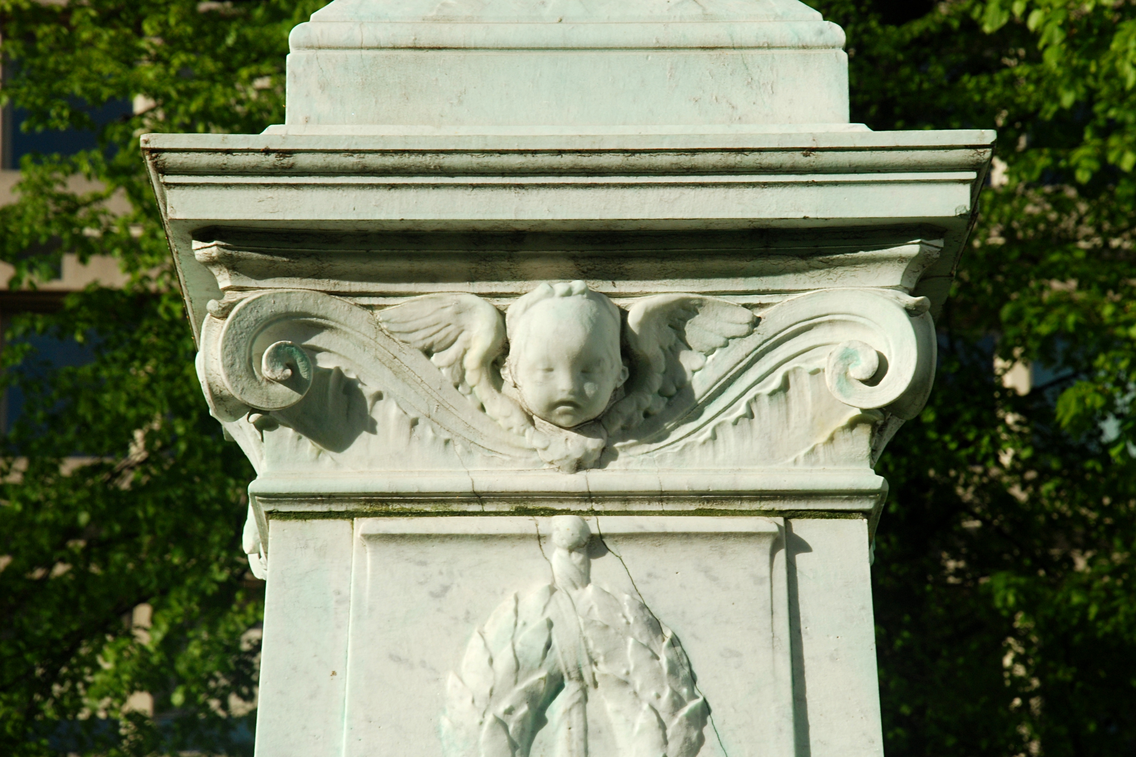 Belgique - Bruxelles - Monument Julien Dillens